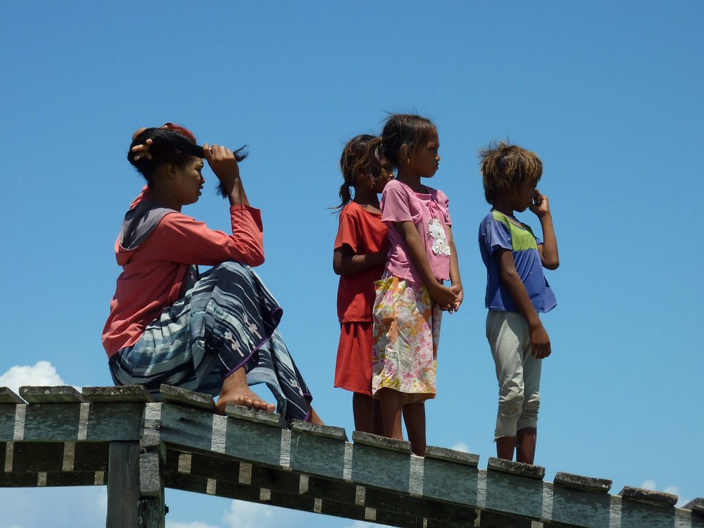 Omadal Kids